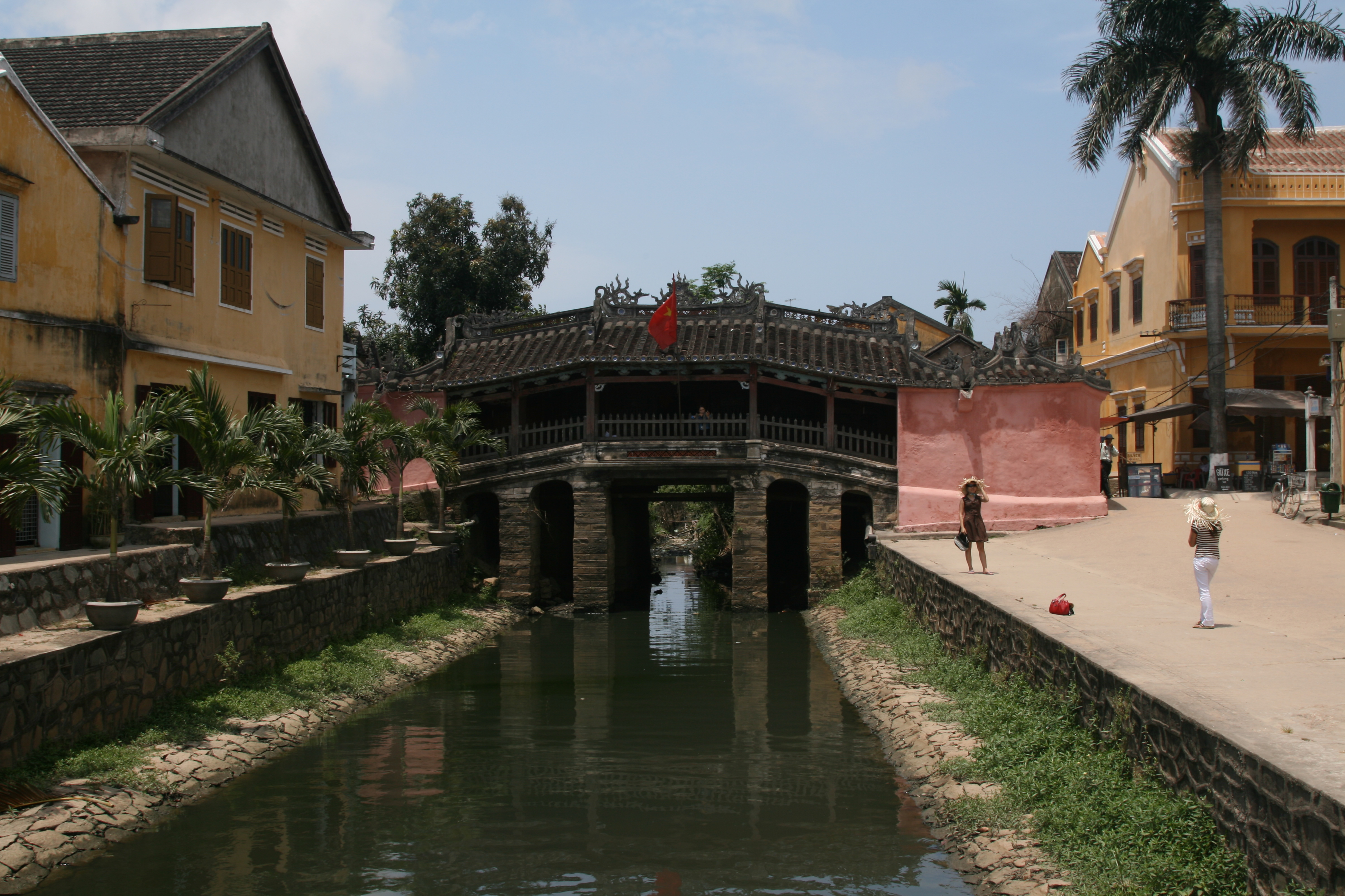 Chùa Cầu.